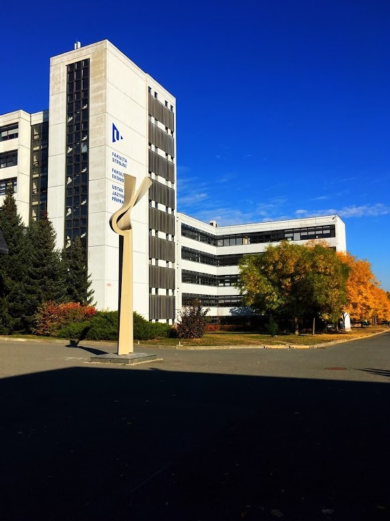 Budova Fakulty strojní v Plzni